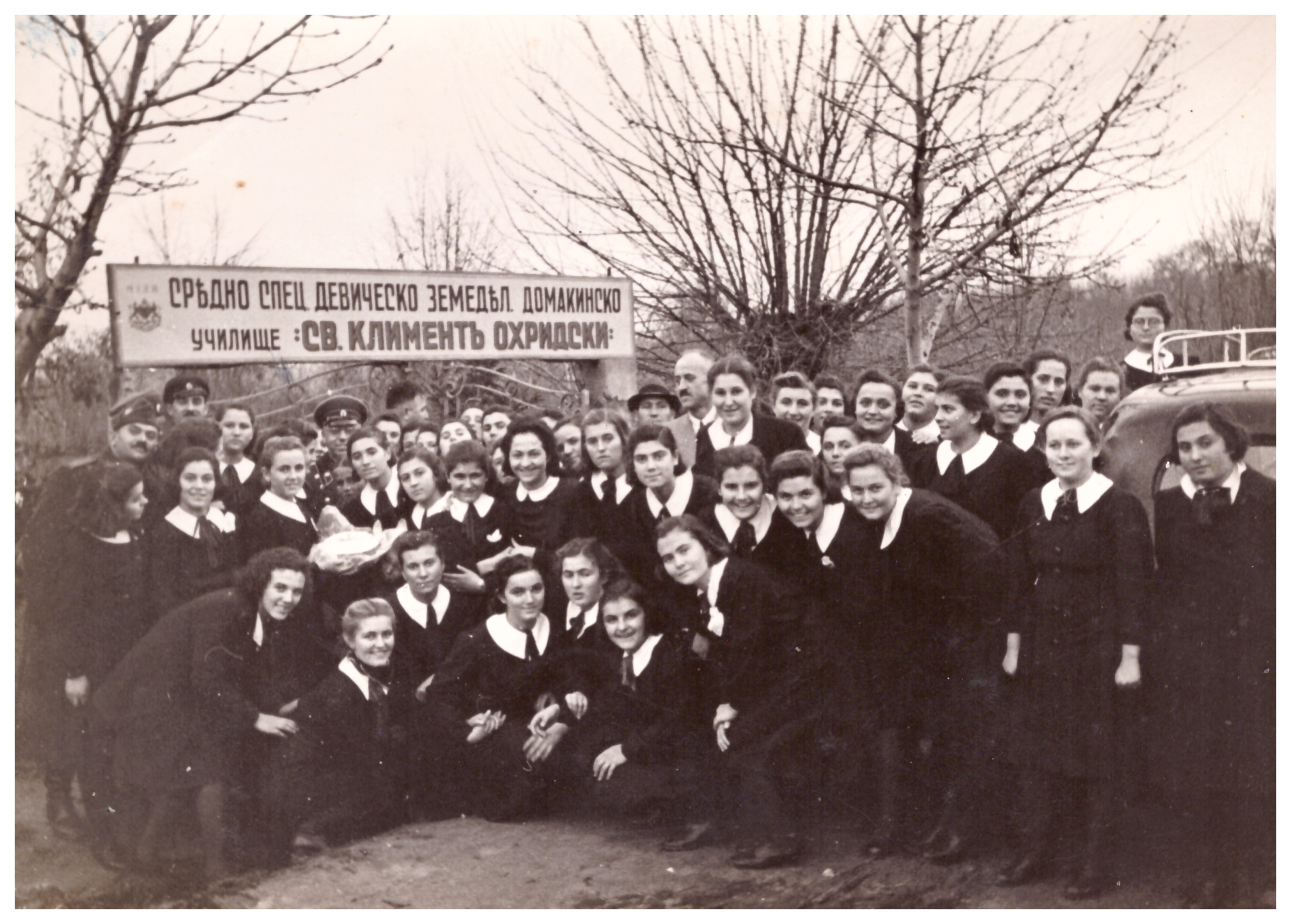 Ученички от Земеделската гимназия в Кюстендил, 1943 г., директор Георги Аракчиев